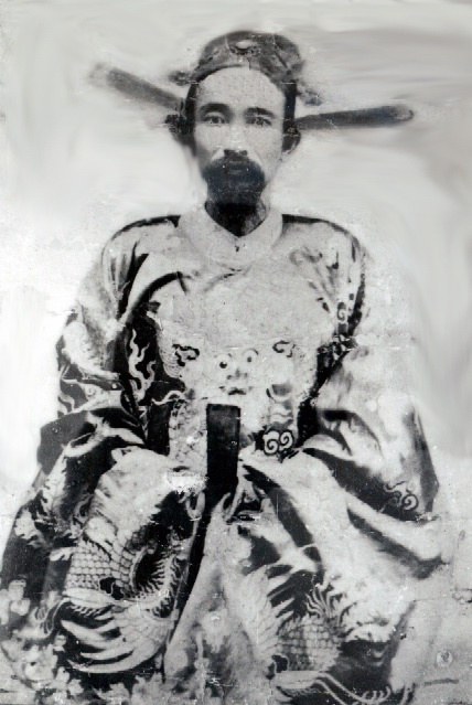 Chân dung cụ Thám Hoa Vũ Phạm Hàm